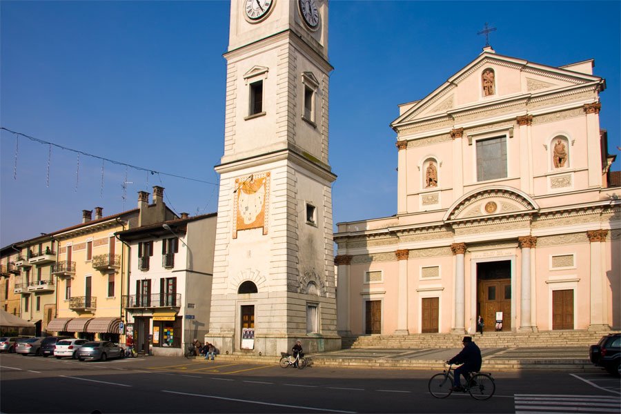 Veduta di piazza Dante a Cameri con la chiesa parrocchiale